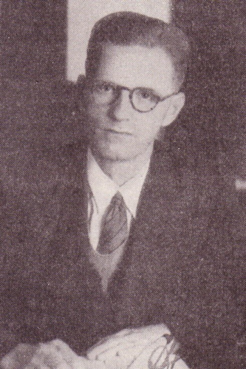 A.J. Hanekom